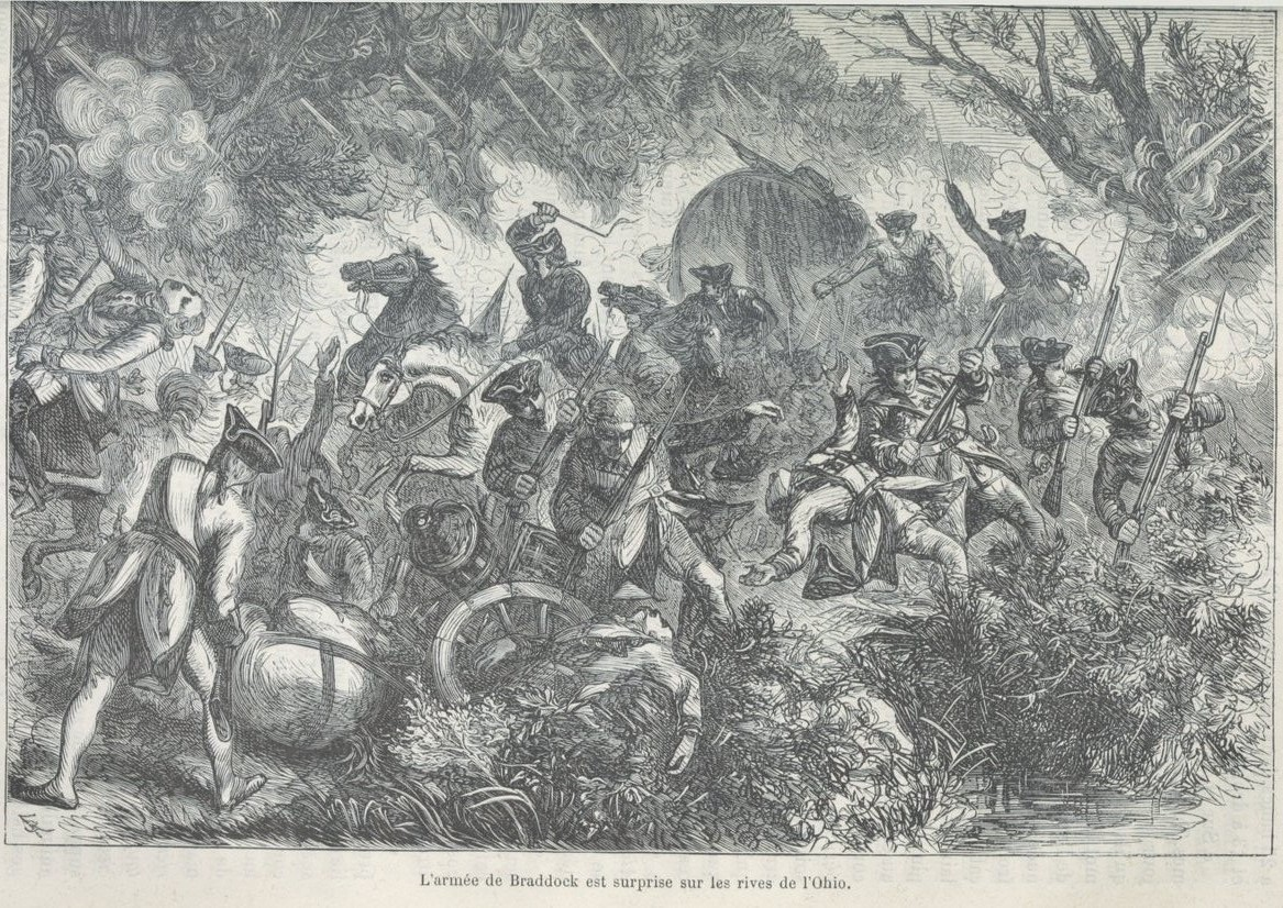 L'armée de Braddock attaquée par les Indiens et les Français en juillet 1755. Gravure française de la fin du XIXème siècle.